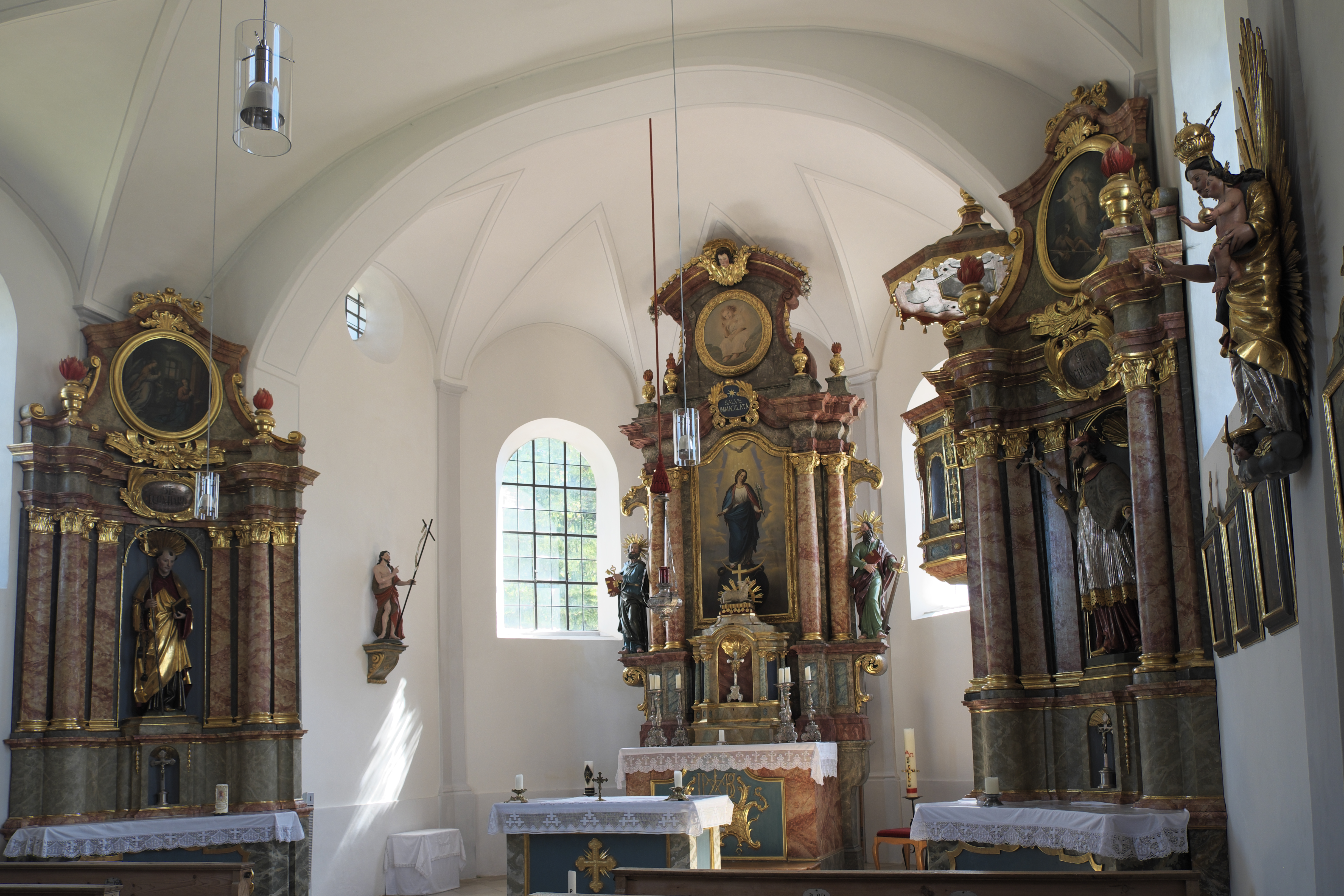 Katholische Nebenkirche Patrona Bavariae in Baierbrunn im Landkreis München (Bayern, Deutschland), Altarraum